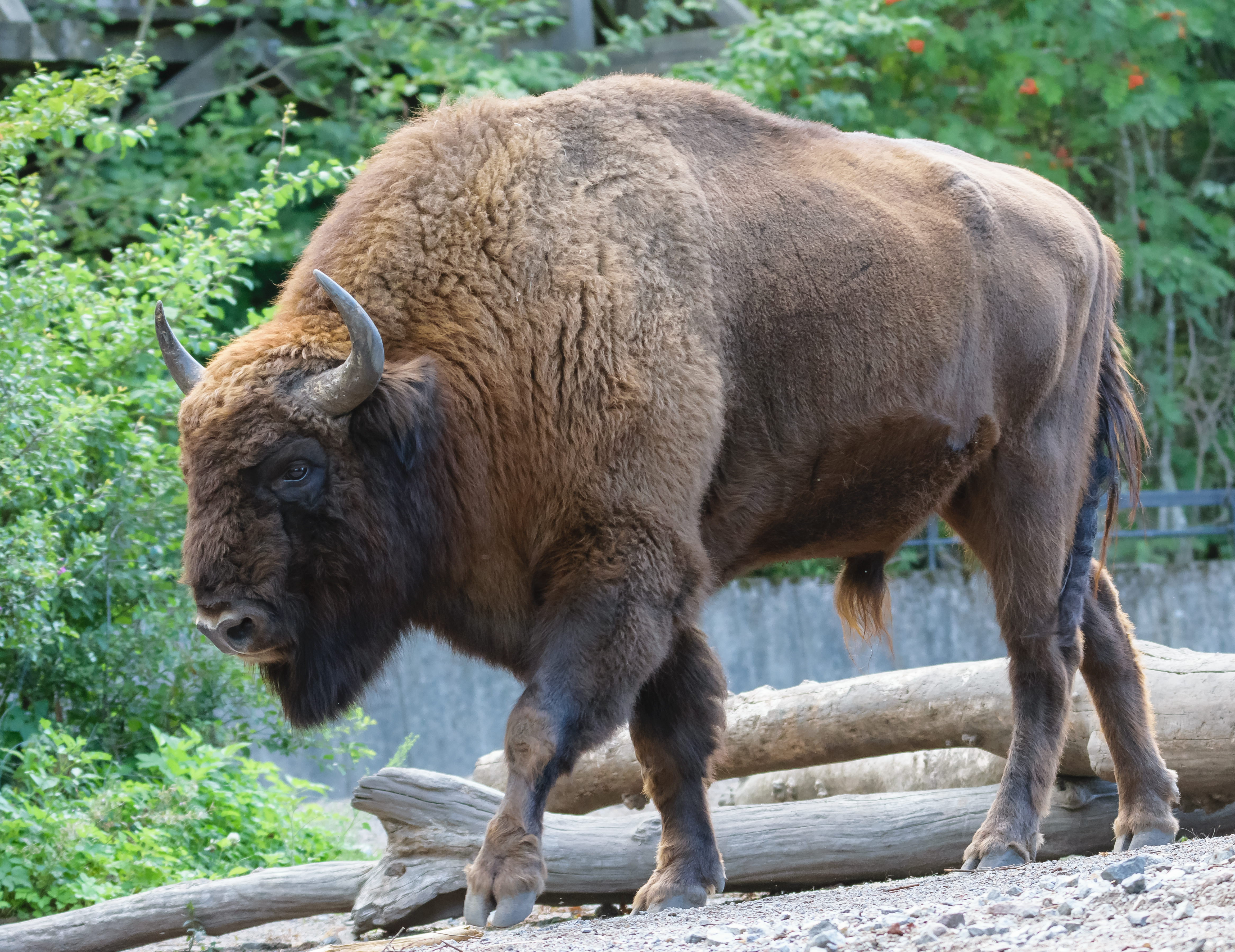 bison-1924